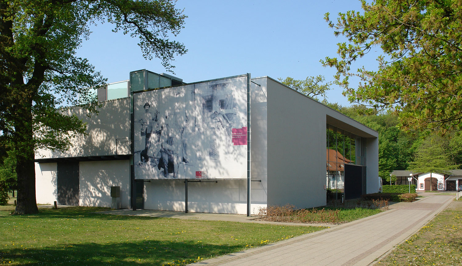 Klinikum Bremen-Ost, Haus im Park. Im Hintergrund Haus 41 (ehemals St.-Jürgen-Asyl)